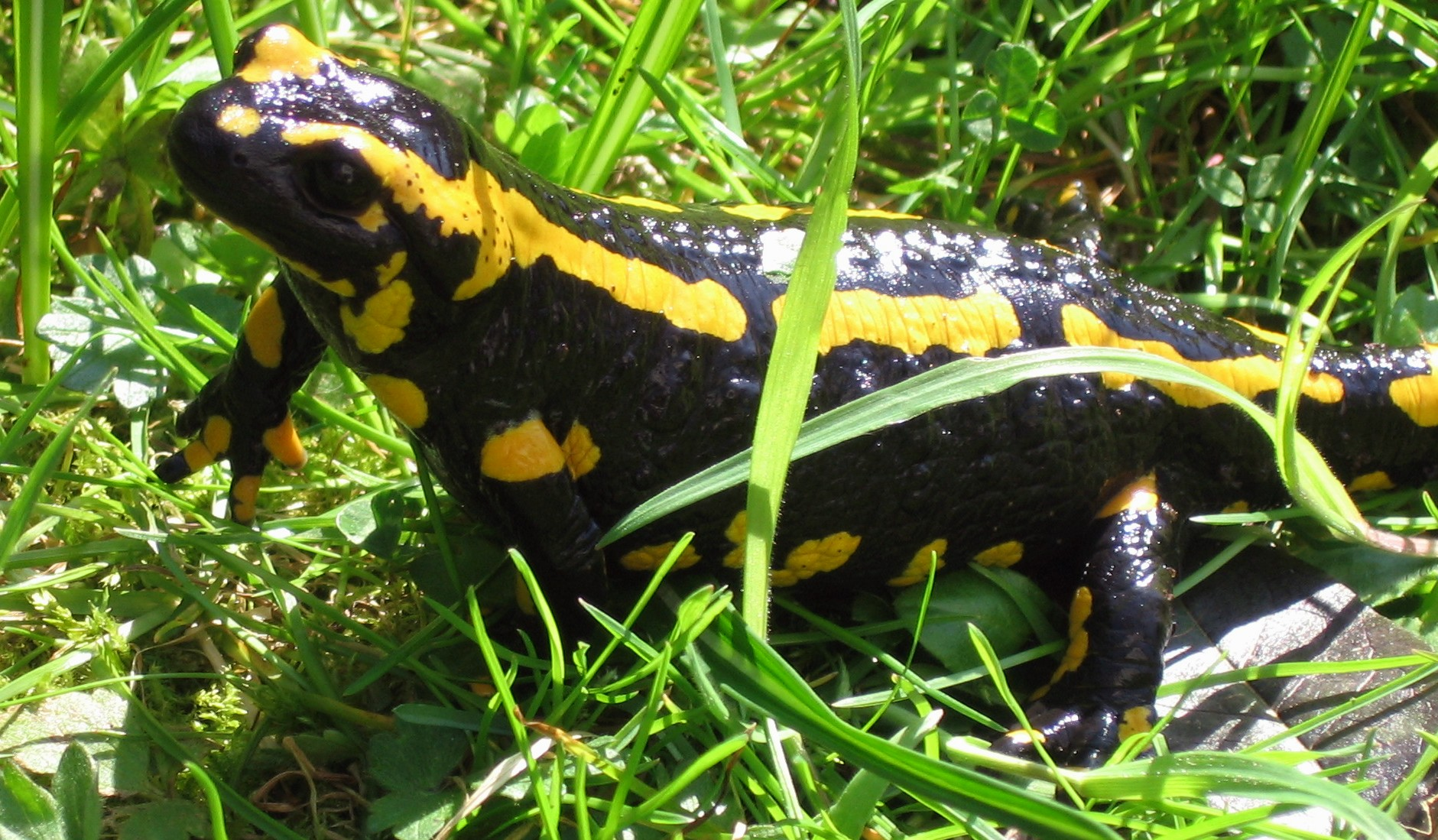 (Salamandra salamandra), – Barred fire salamander, female adult